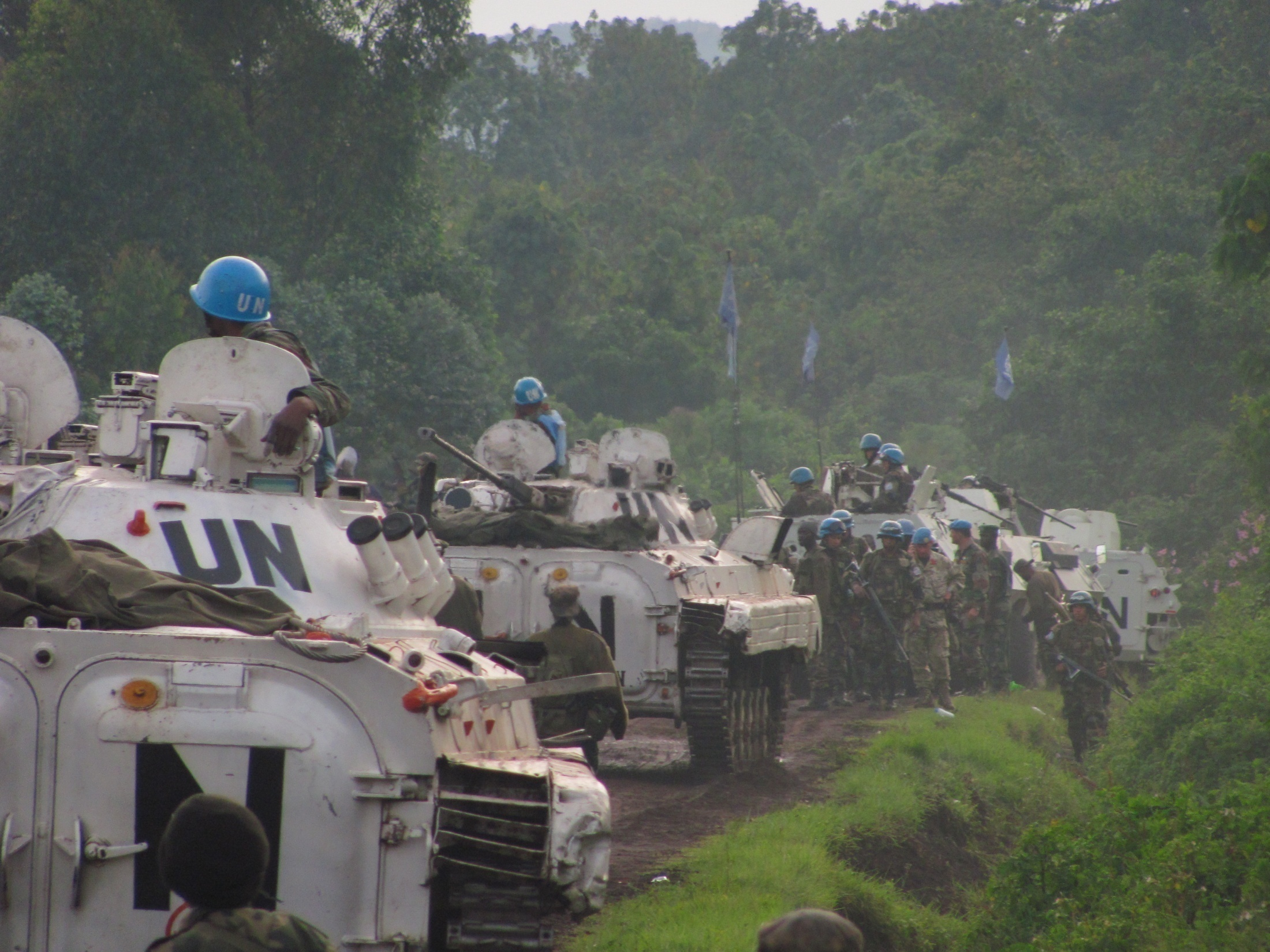 Casques bleus de la MONUSCO sur la dernière ligne de défense près de Goma. Photo MONUSCO